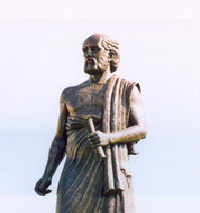 Aristarco di Samo